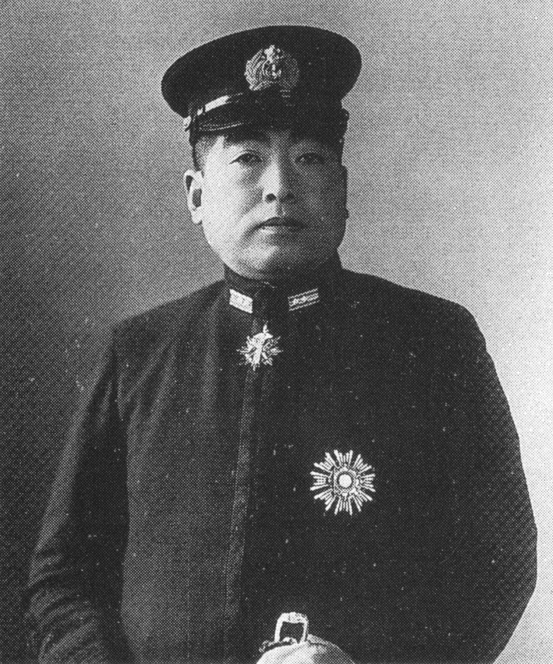 小林仁は大日本帝国海軍中将です